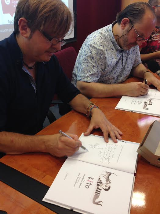 Ignasi Blanch signant el seu últim llibre, "Kioto" al Saló de Plens de l'Ajuntament de Roquetes